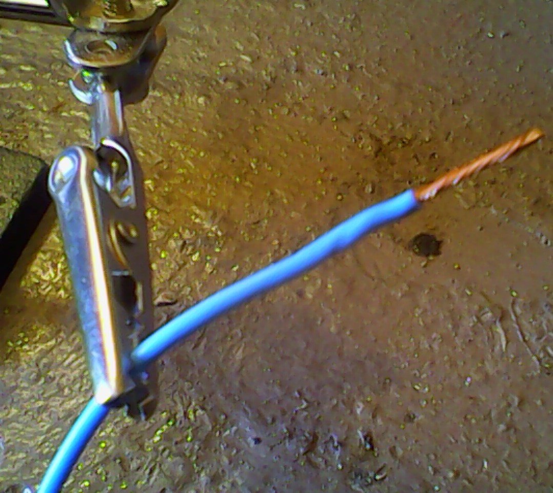 Провод зажатый в третьей руке